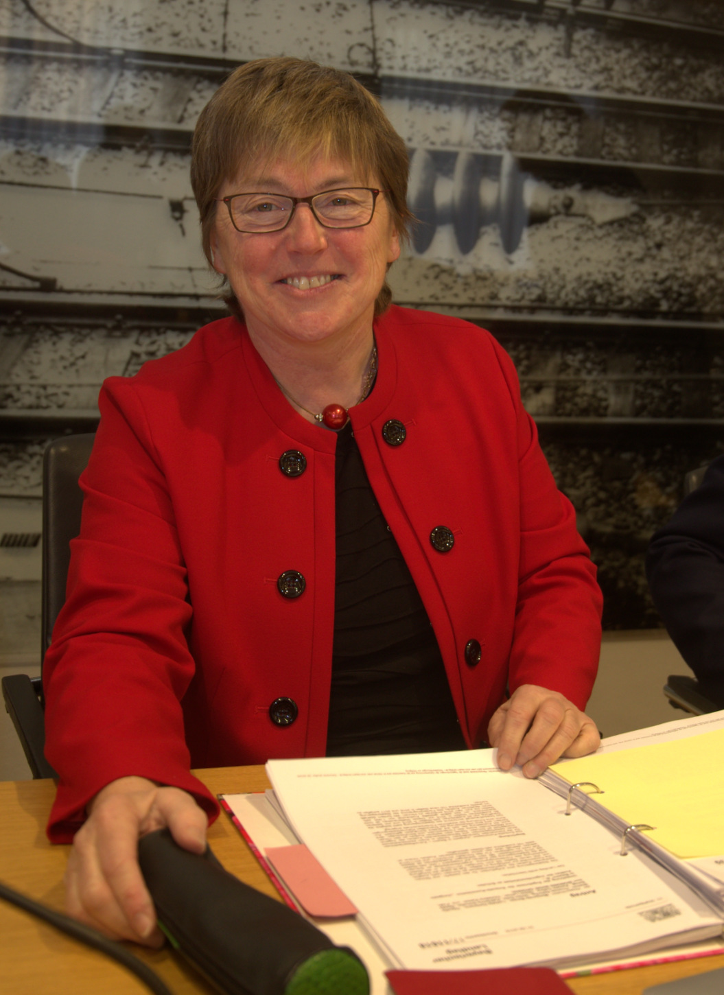 Ilona Deckwerth, deutsche Politikerin (SPD) und (seit 1.01.2017) Abgeordnete im Bayerischen Landtag. Hier am 2. Februar 2017 vor Beginn einer Ausschusssitzung im Bayerischen Landtag (Raum S 401).